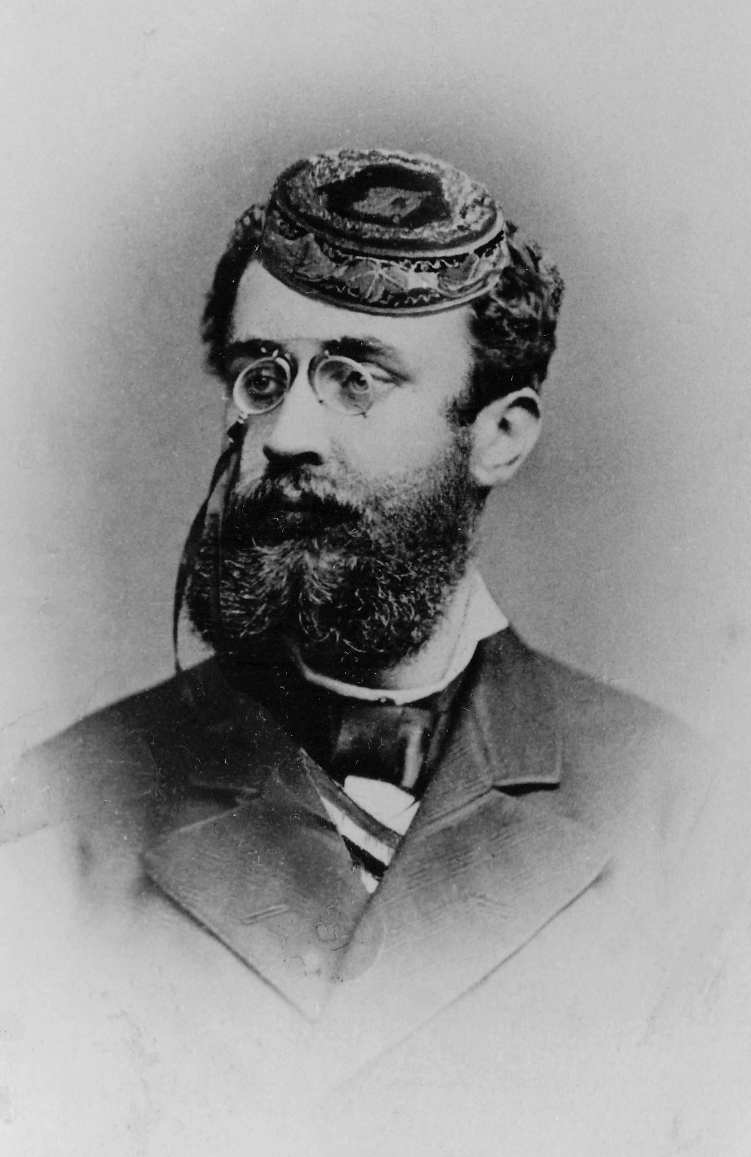 Porträtfotografie von Otto Heuer (Literaturhistoriker) als Angehörigem des Corps Thuringia Leipzig.